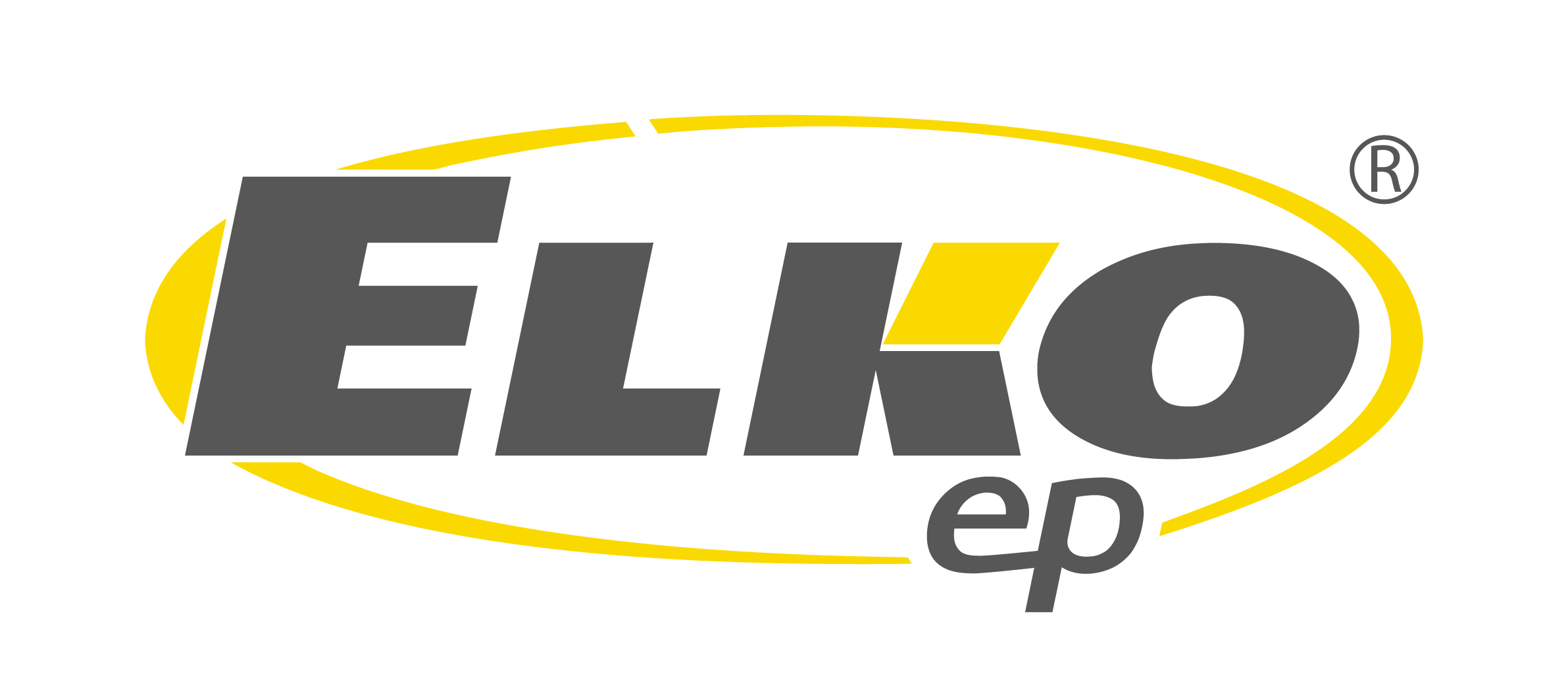 Logo firmy